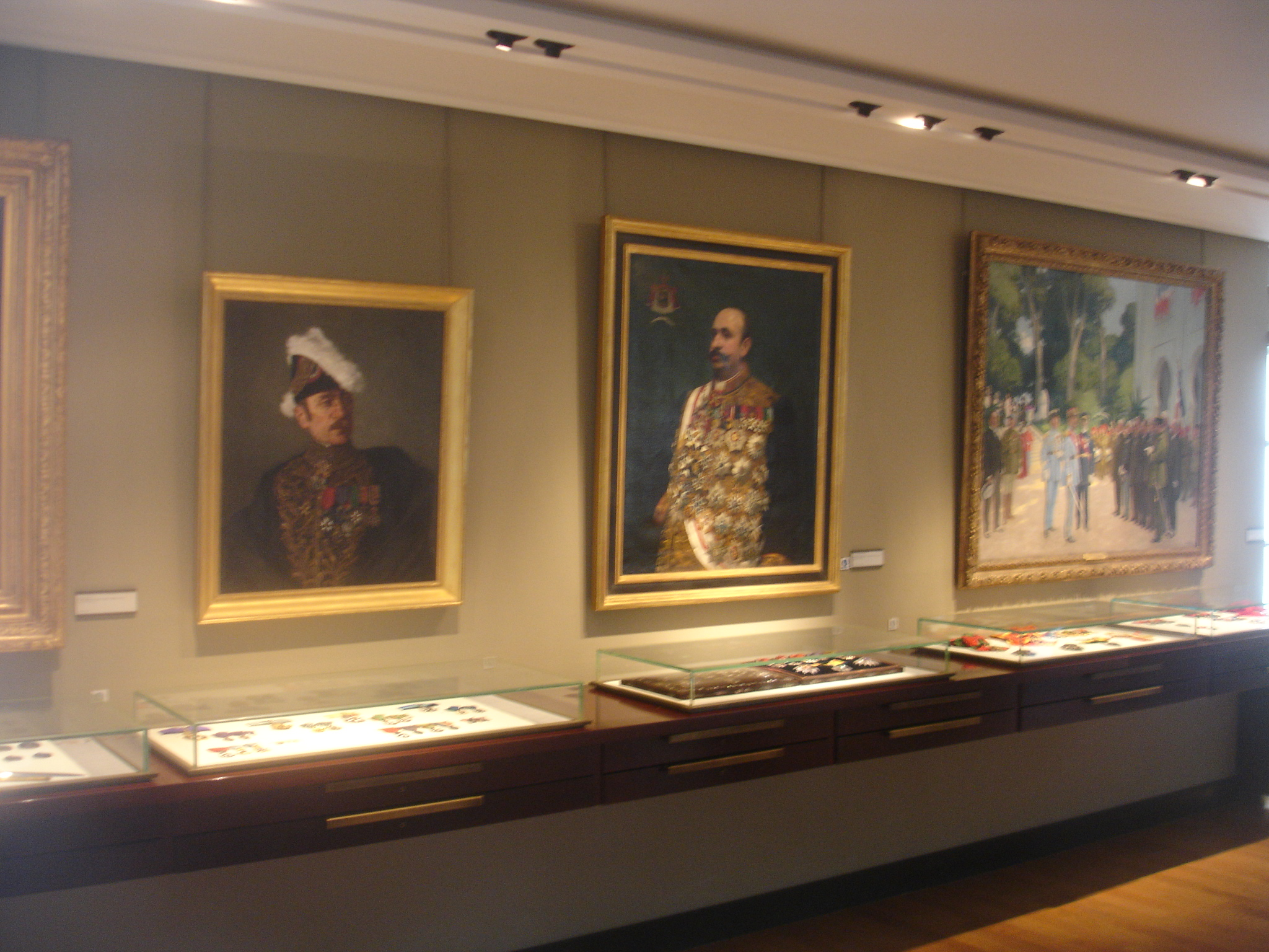 musee ordres paris